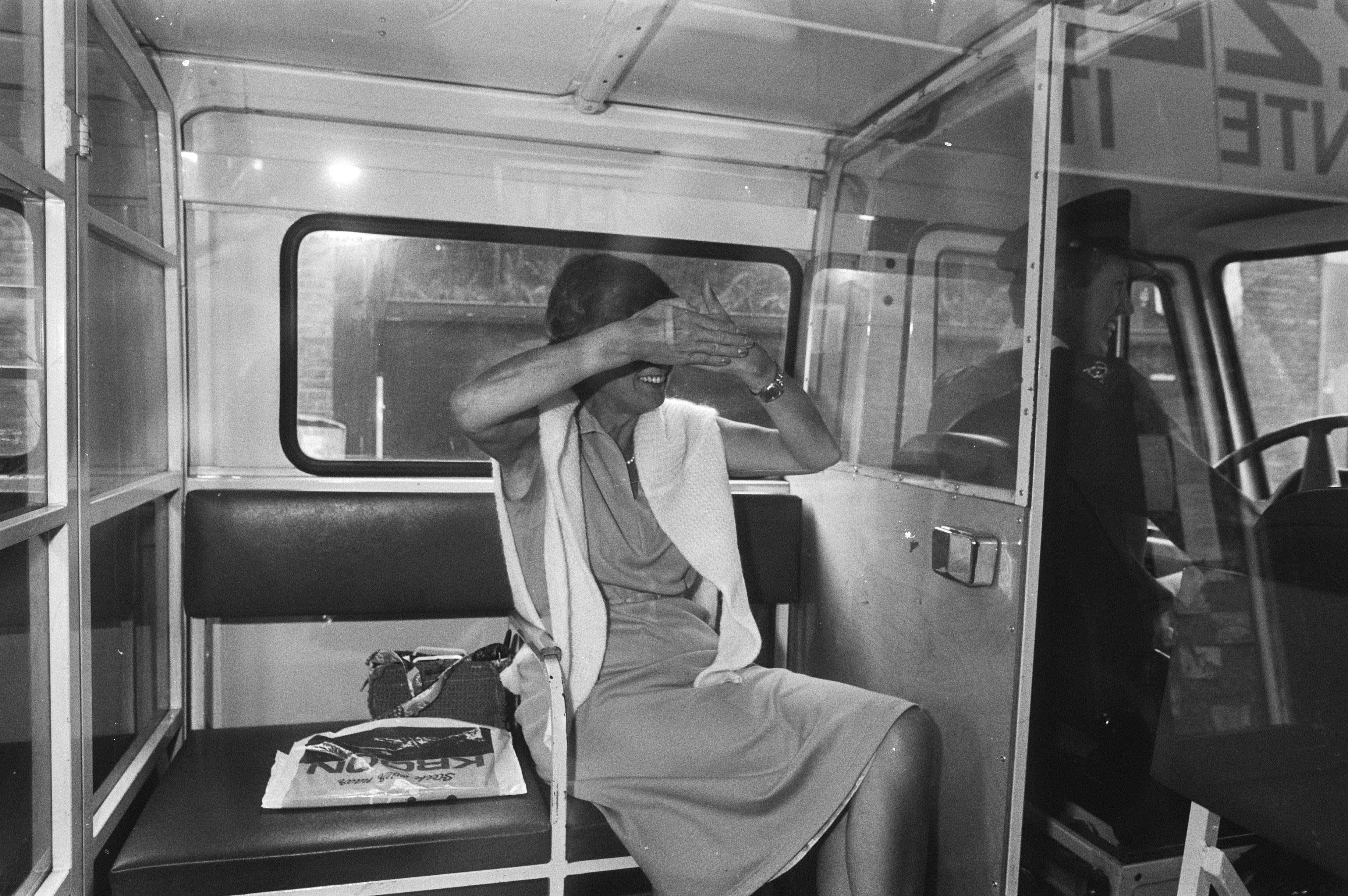 Collectie / Archief : Fotocollectie Anefo Reportage / Serie : Behandeling van de zaak van ex-notaris Josje Slis-Stroom voor de Amsterdamse rechtbank Beschrijving : Aankomst van Slis-Stroom in een arrestantenbus bij het Paleis van Justitie Datum : 17 september 1981 Locatie : Amsterdam, Noord-Holland Trefwoorden : Paleis van Justitie, processen, rechtbanken Persoonsnaam : Slis-Stroom, Josje Fotograaf : Dijk, Hans van / Anefo Auteursrechthebbende : Nationaal Archief Materiaalsoort : Negatief (zwart/wit) Nummer archiefinventaris : bekijk toegang 2.24.01.05 Bestanddeelnummer : 931-6866